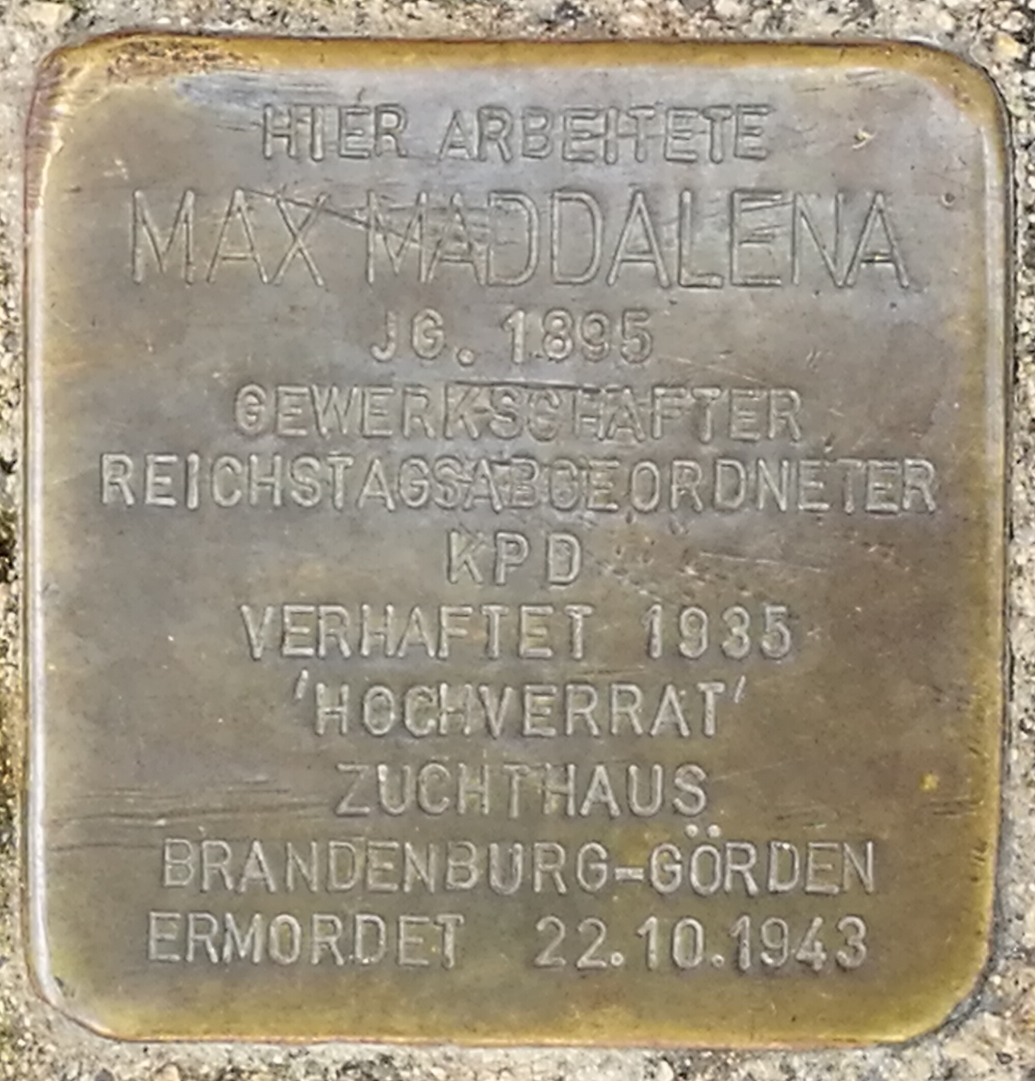 Deutschland (D) - Baden-Württemberg (BW) - Landkreis Konstanz (KN) - Singen (Hohentwiel): Stolperstein für 'Max Maddalena'